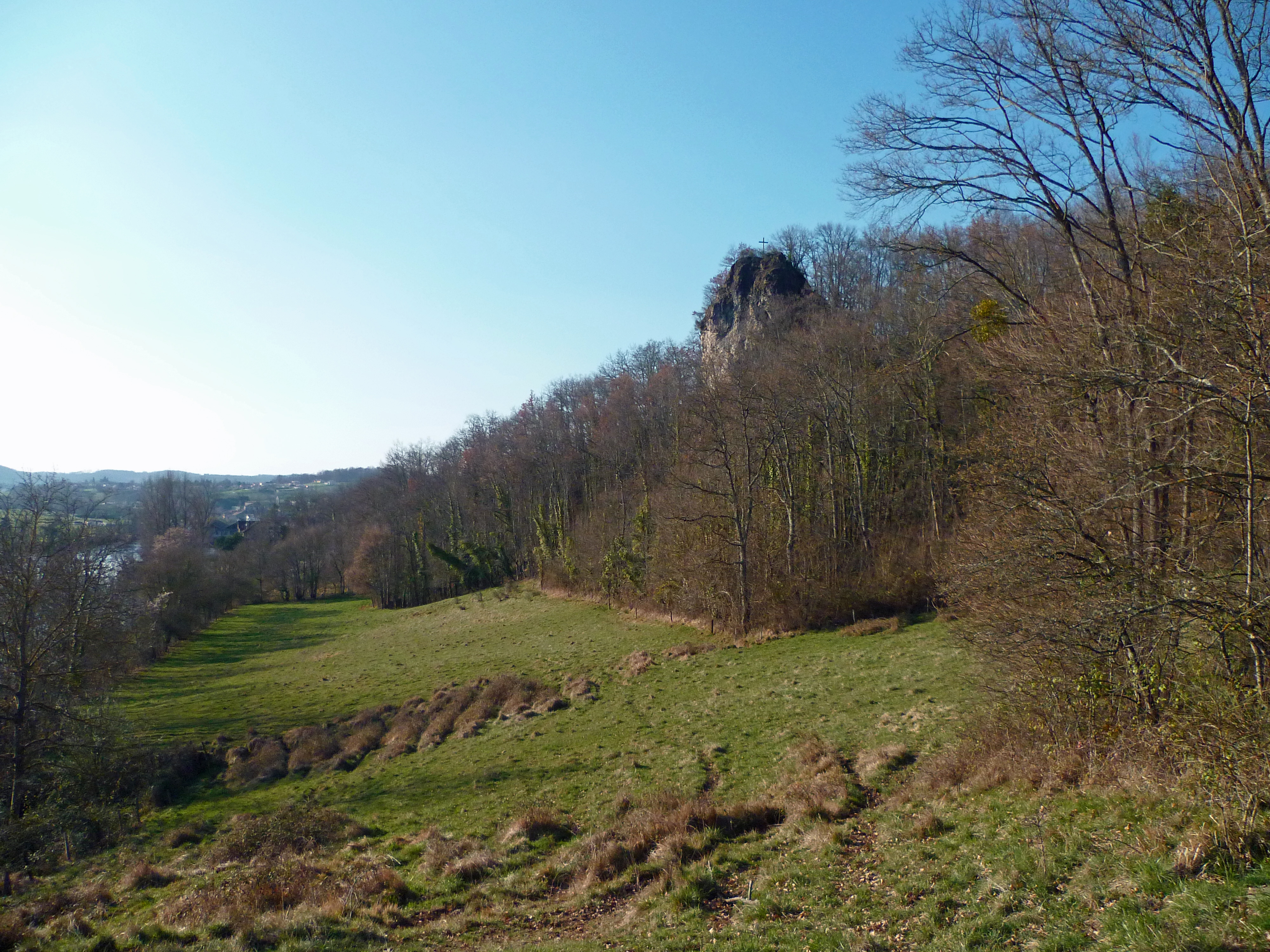 Taurignan-Vieux (Ariège, Midi-Pyrénées, France) : Vue vers Roquelaure et son rocher.